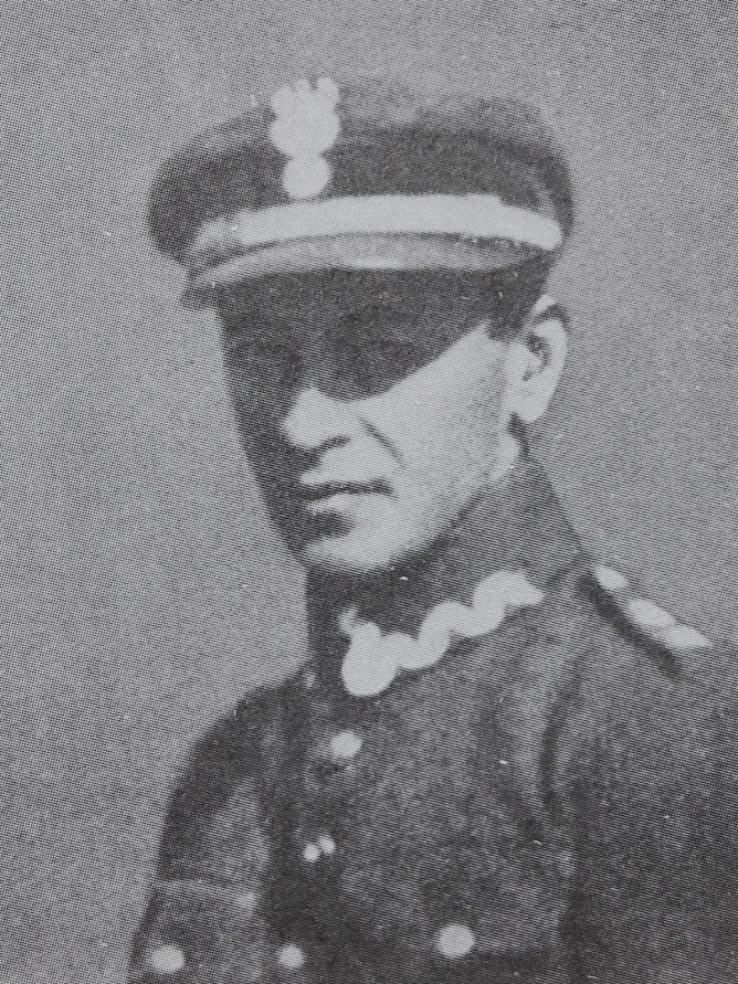 Porucznik pilot Wiktor Robotycki około 1918 roku.